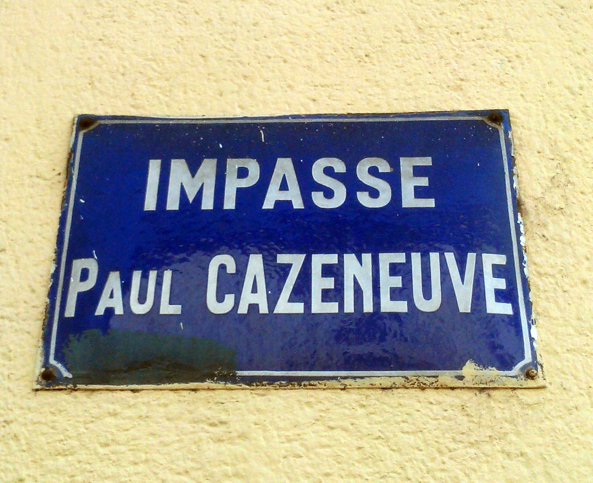 Plaque de l'impasse Paul Cazeneuve, dans le 8e arrondissement de Lyon.